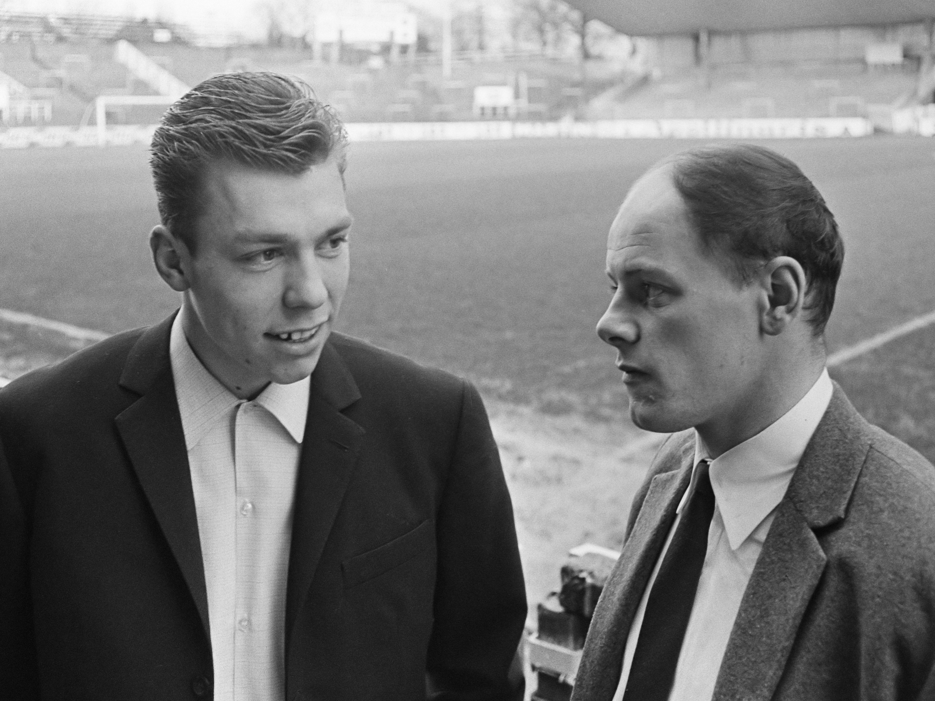 Jan Mulder (links) en Gerard 'Pummie' Bergholtz bij Anderlecht 14 februari 1966